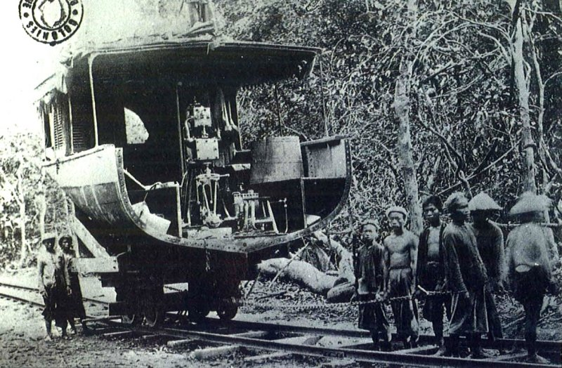 Le tronçon du 'Huang-Luang' traverse l'île de Khône